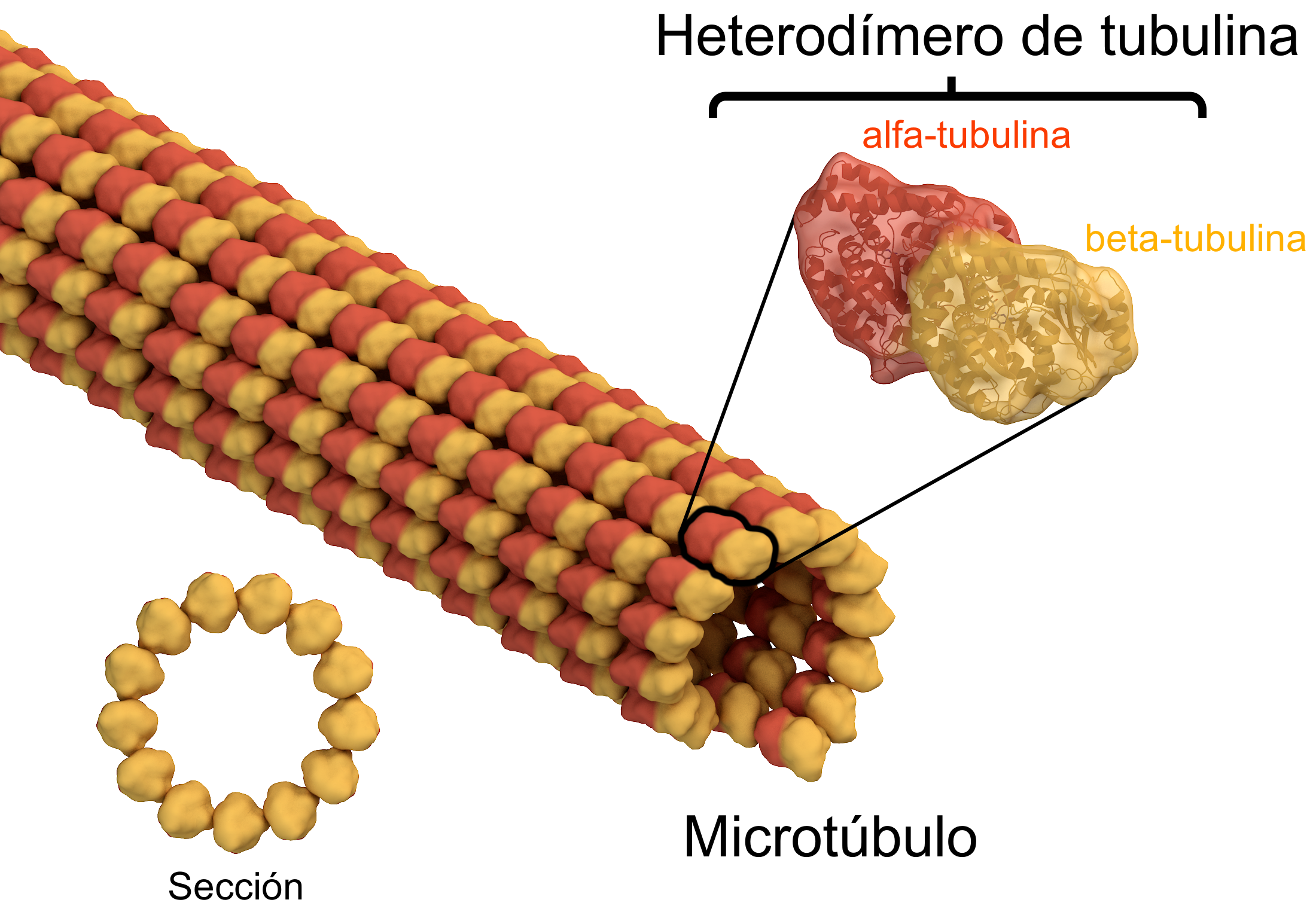 Esquema en el que se representa un microtúbulo formado por heterodímeros de tubulina. Cada heterodímero contiene dos subunidades, una de se ellas se llama alfa-tubulina y otra beta-tubulina.